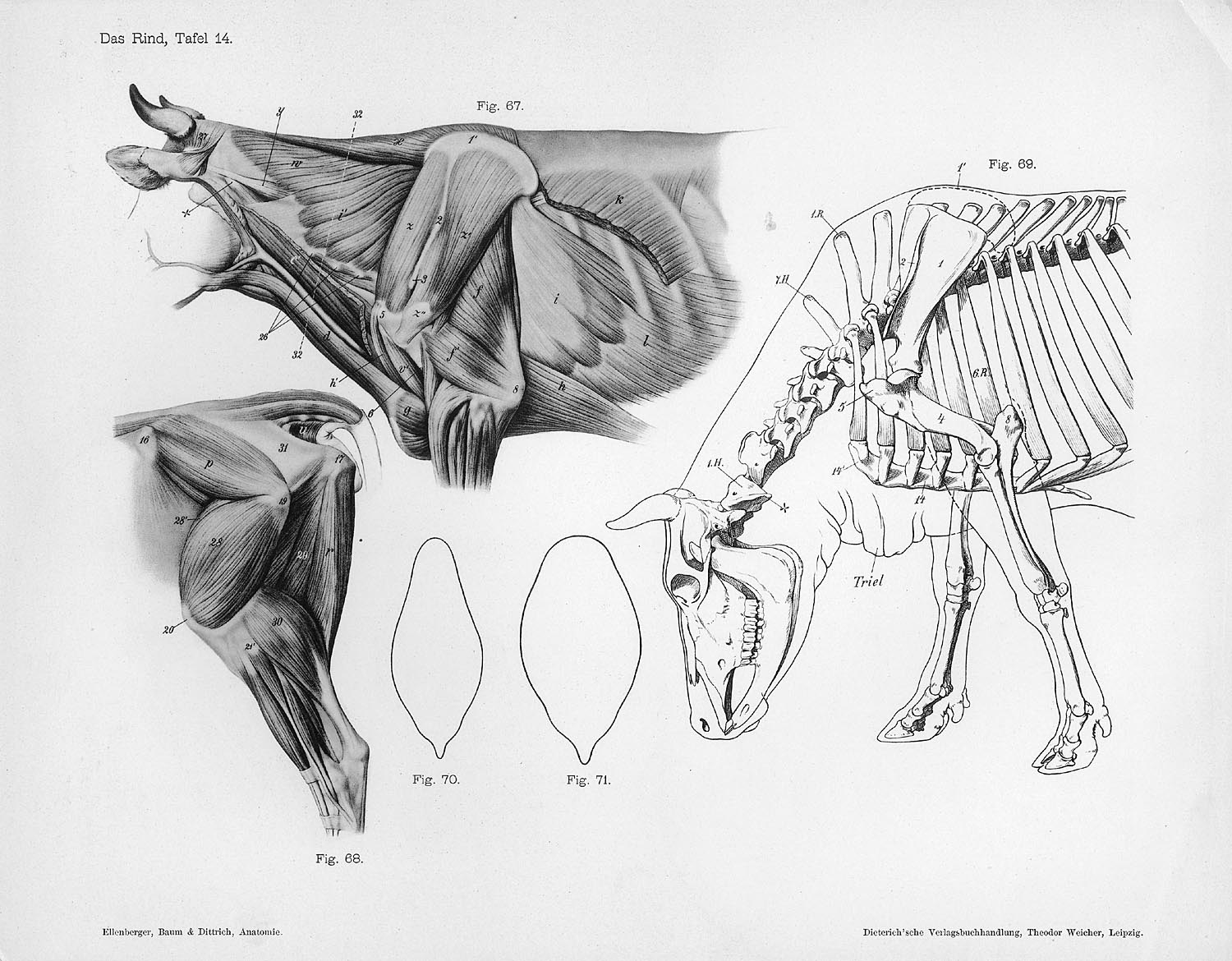 Animal anatomical engraving from Handbuch der Anatomie der Tiere für Künstler - Hermann Dittrich, illustrator.